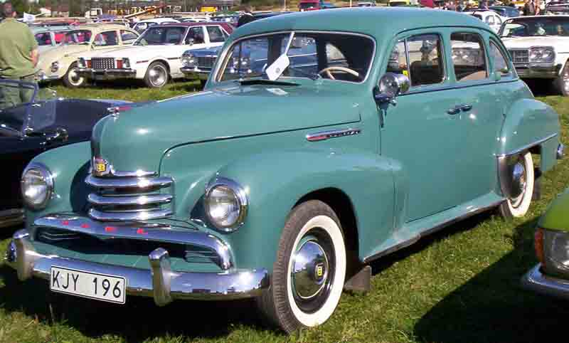 Opel Kapitän 4-Door Sedan 1951